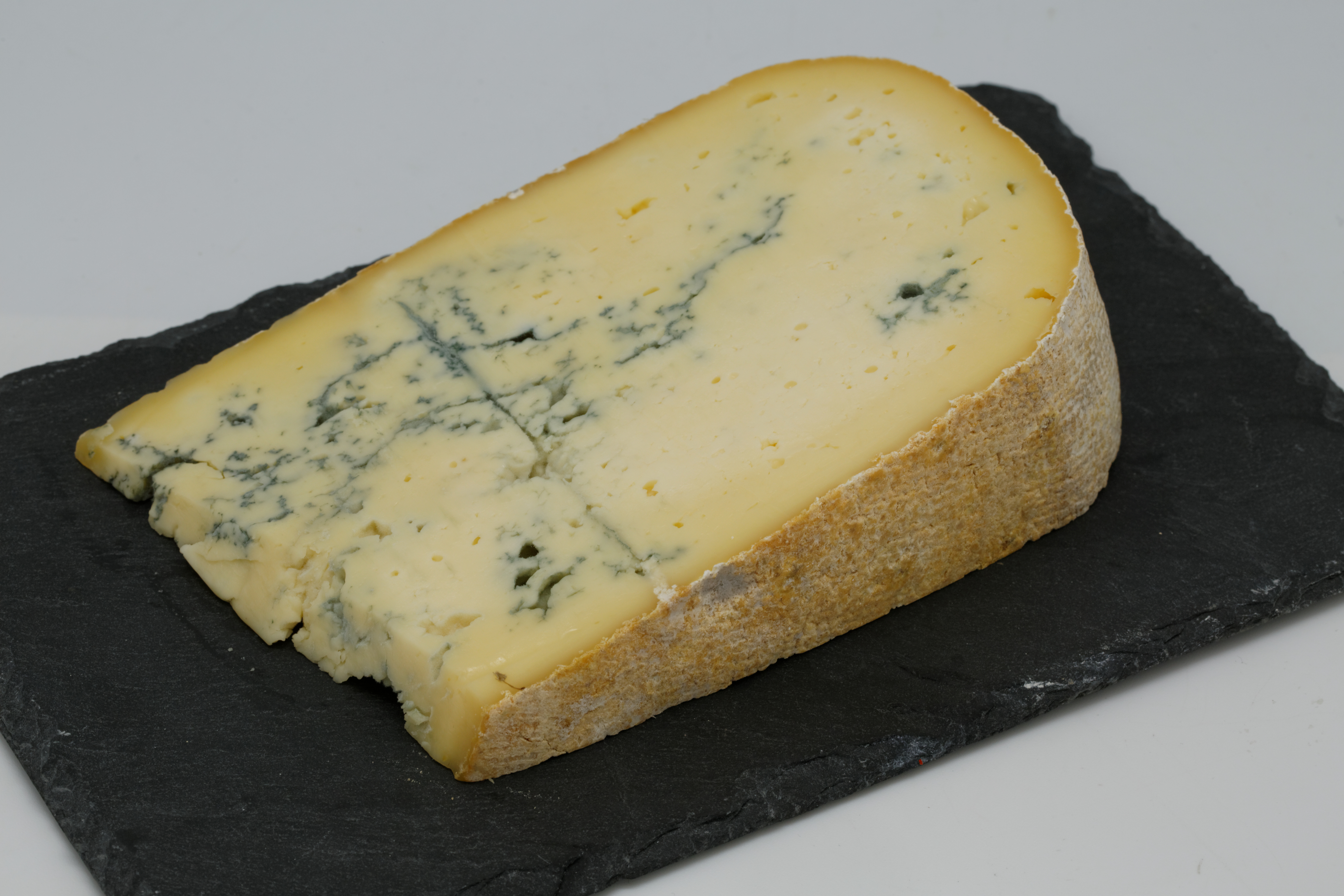 Bleu de Gex